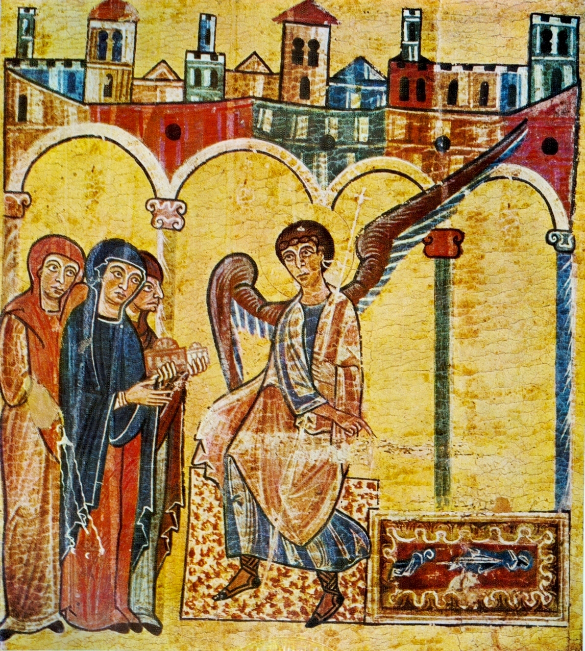 Crucifix_№15_San_Matteo,_detail